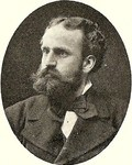 Billnäsin ruukin omistaja